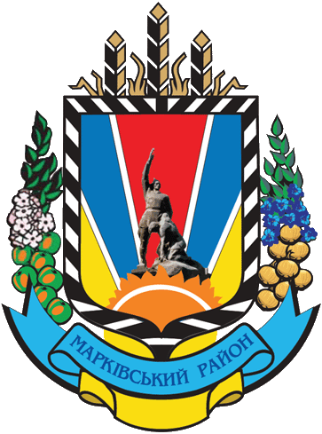 Герб Марківського району